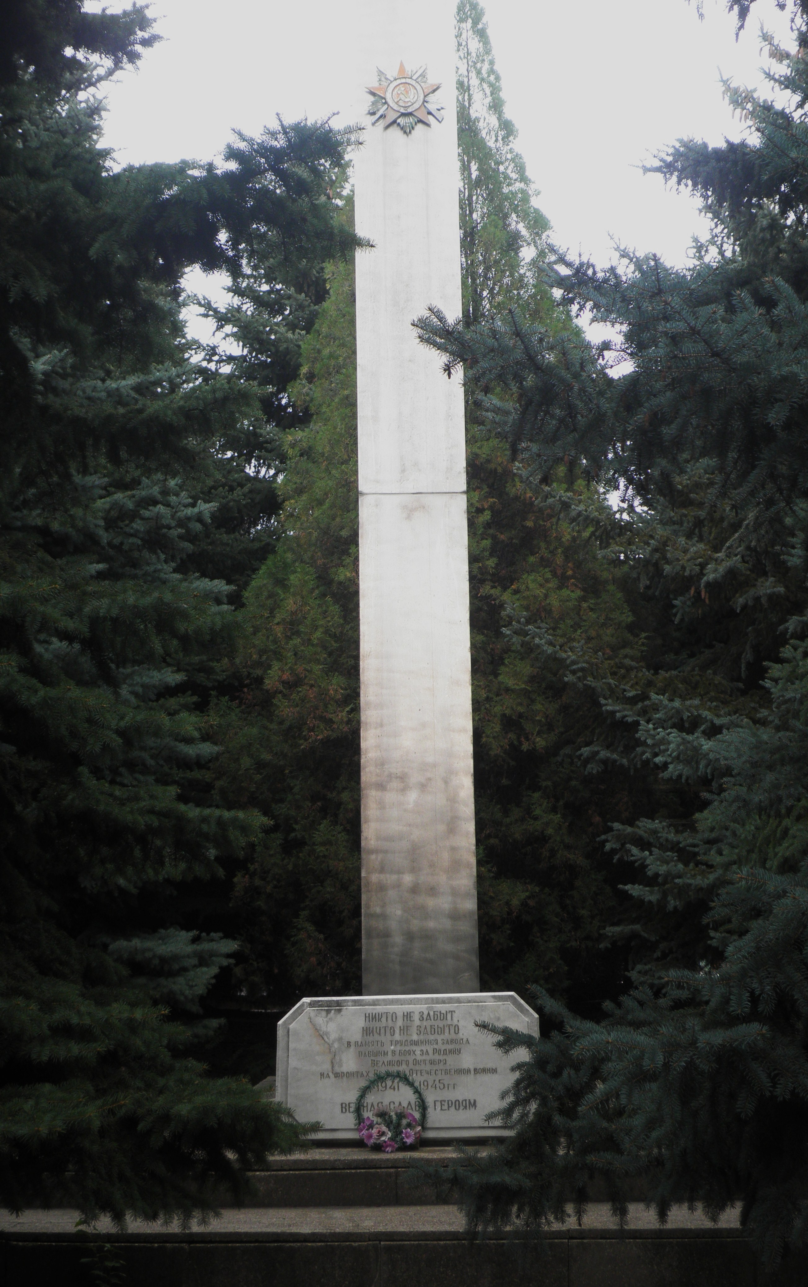 Олексієво-Дружківська сел./р, смт Олексієво-Дружківка.